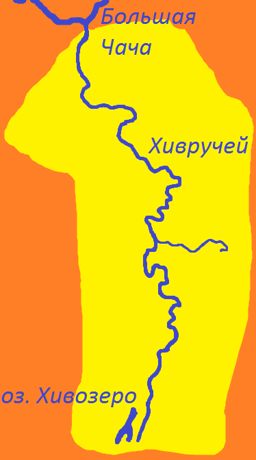 Бассейн реки Хивручей (карта).